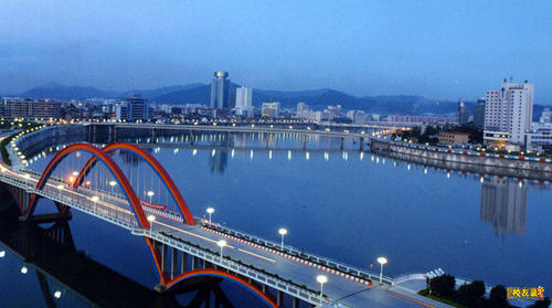 從龍德大橋東側大樓向西北遙望劍英大橋及梅江橋